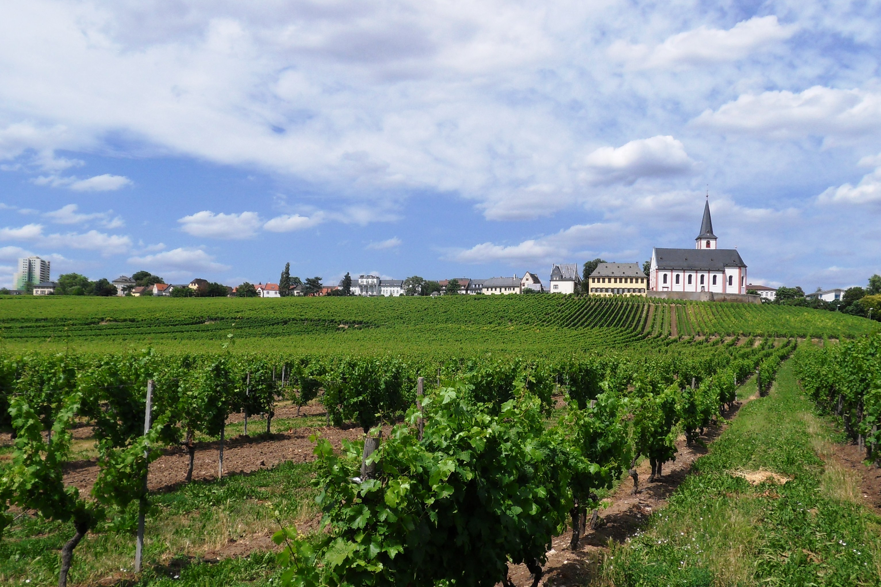 Ansicht der Stadt Hochheim am Main von Süden über die Weinbergslagen Stielweg (unten) und Domdechaney (oben)